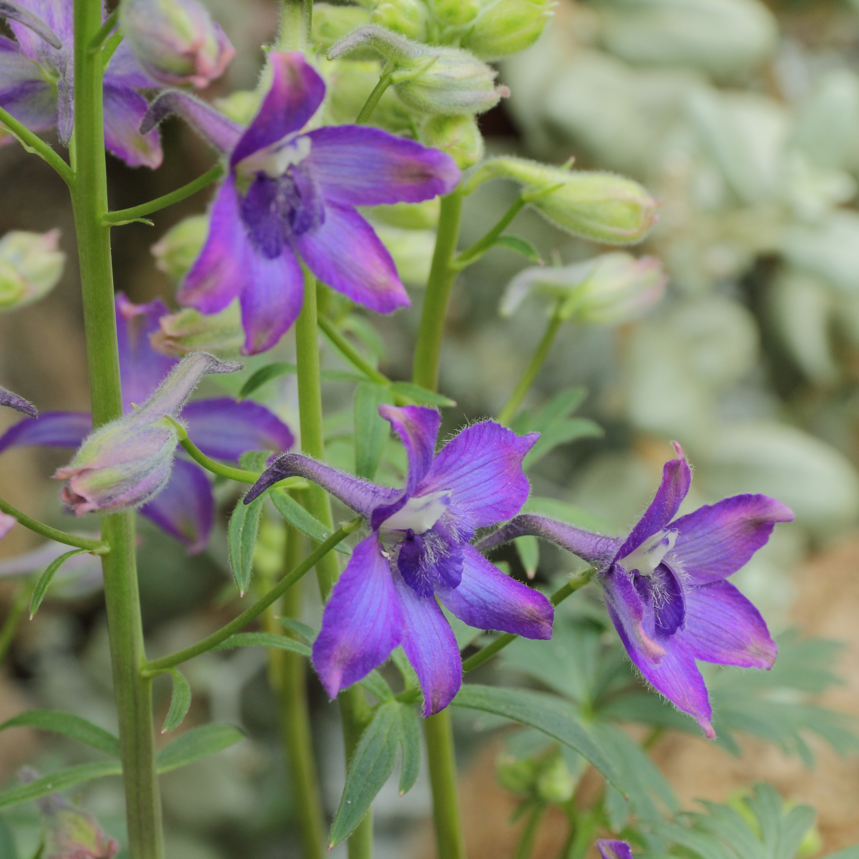 Delphinium glareosum i Göteborgs Botaniska Trädgård.